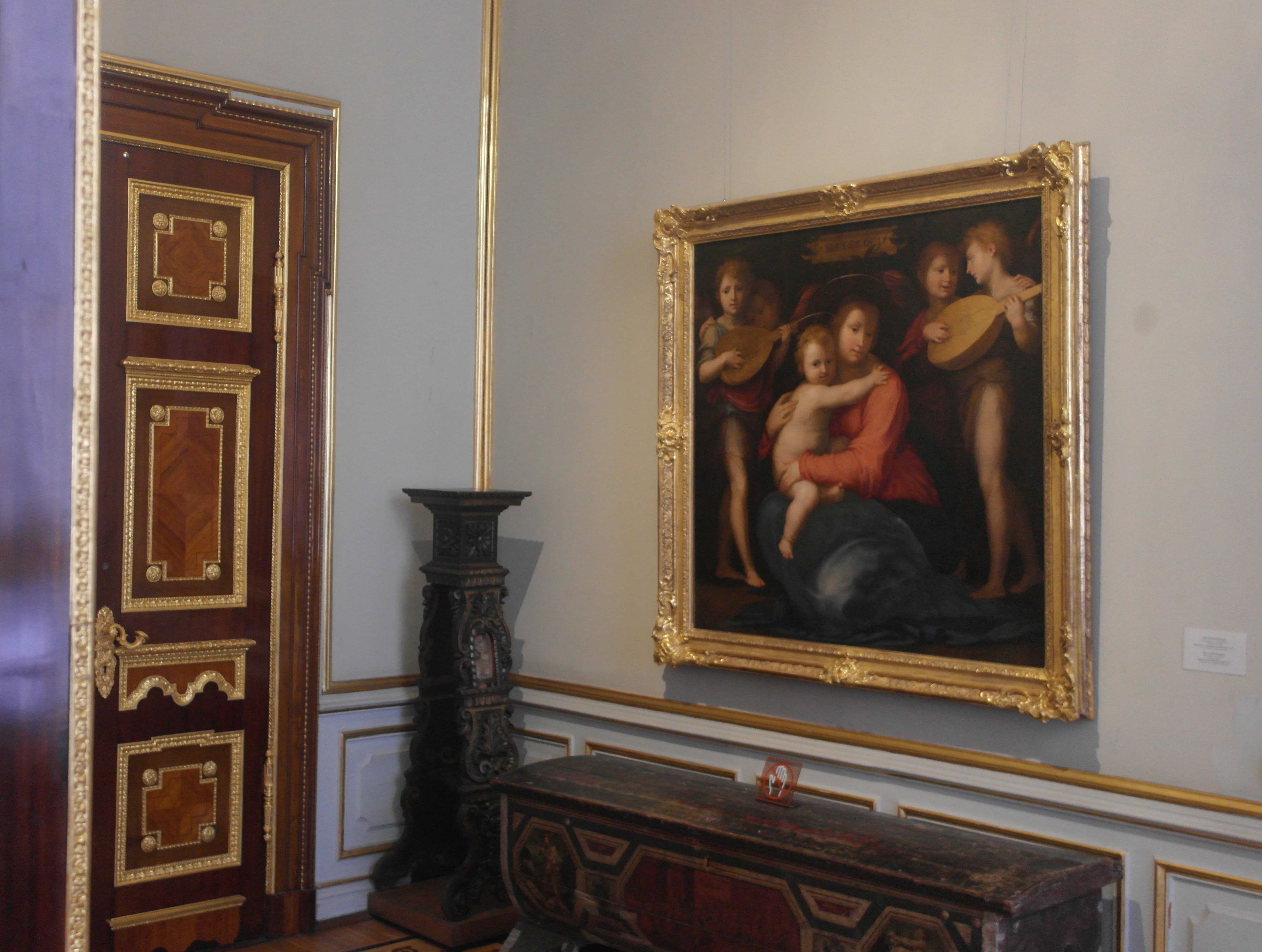 Картина фра Бартоломео